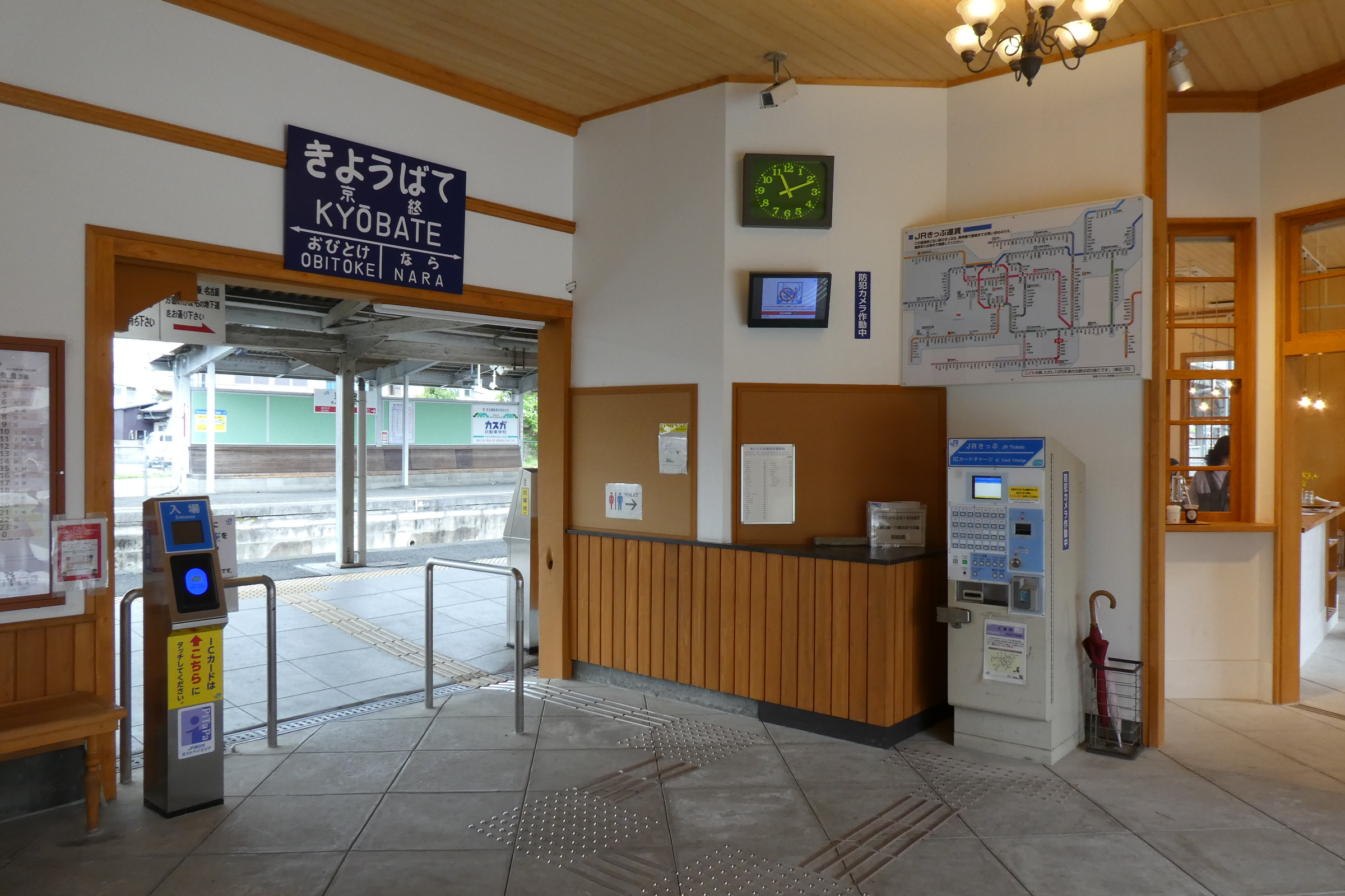 万葉まほろば線（桜井線）京終駅改札。